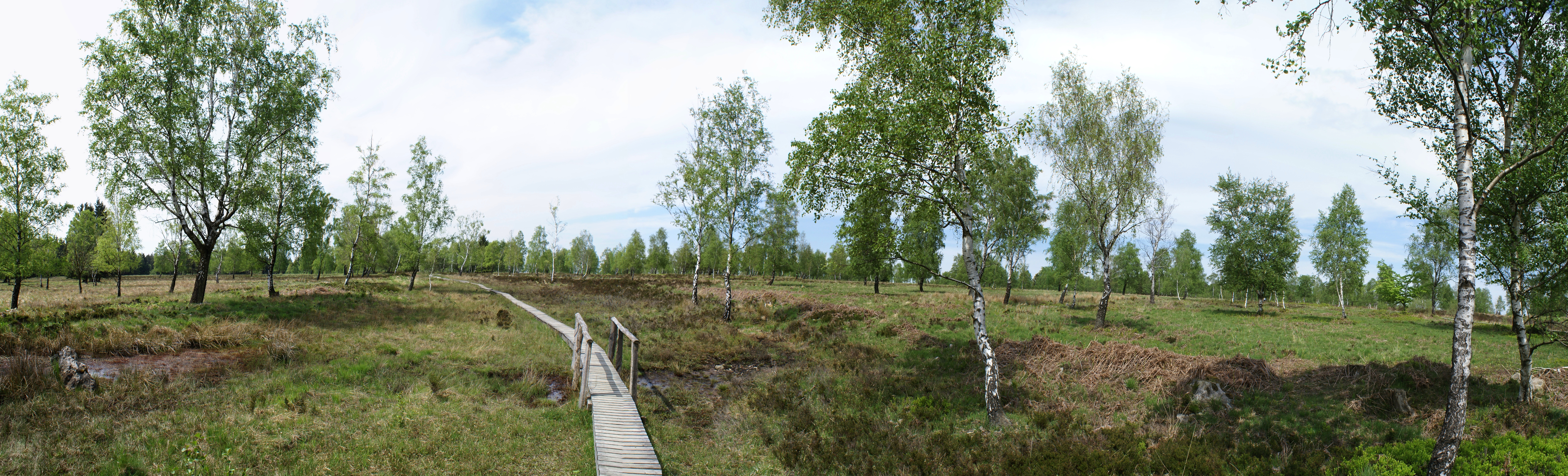 Struffelt ist ein Moorgebiet und Naturschutzgebiet oberhalb von Roetgen.